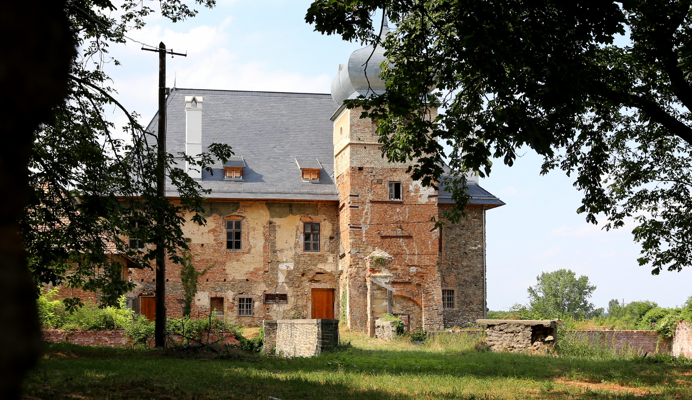 Egykori Erdődy kastély Jánosházán